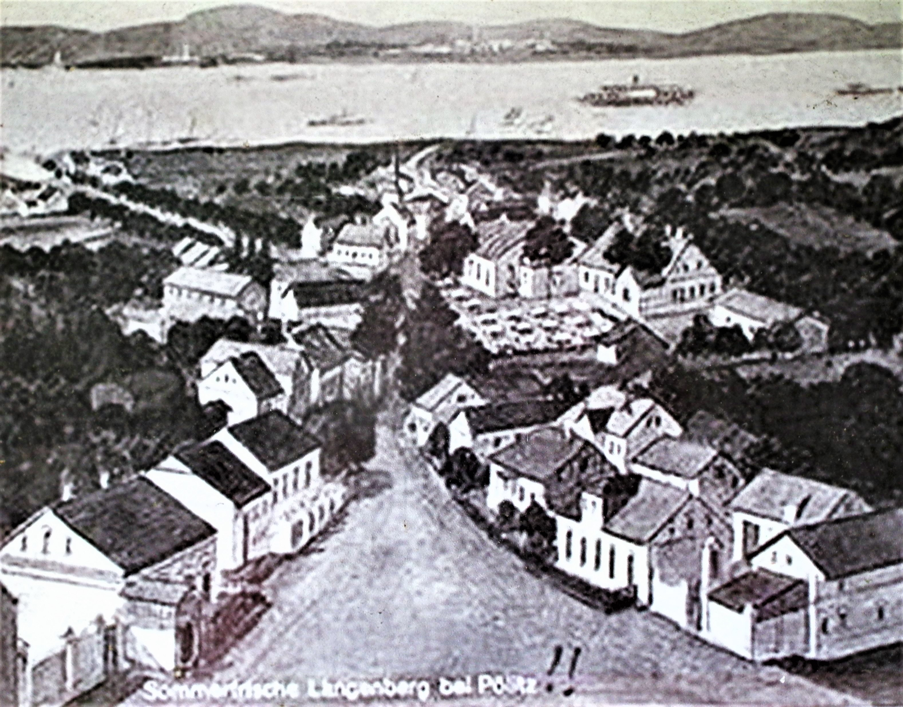 Tablica informacyjna w Świętej nad Domiążą.